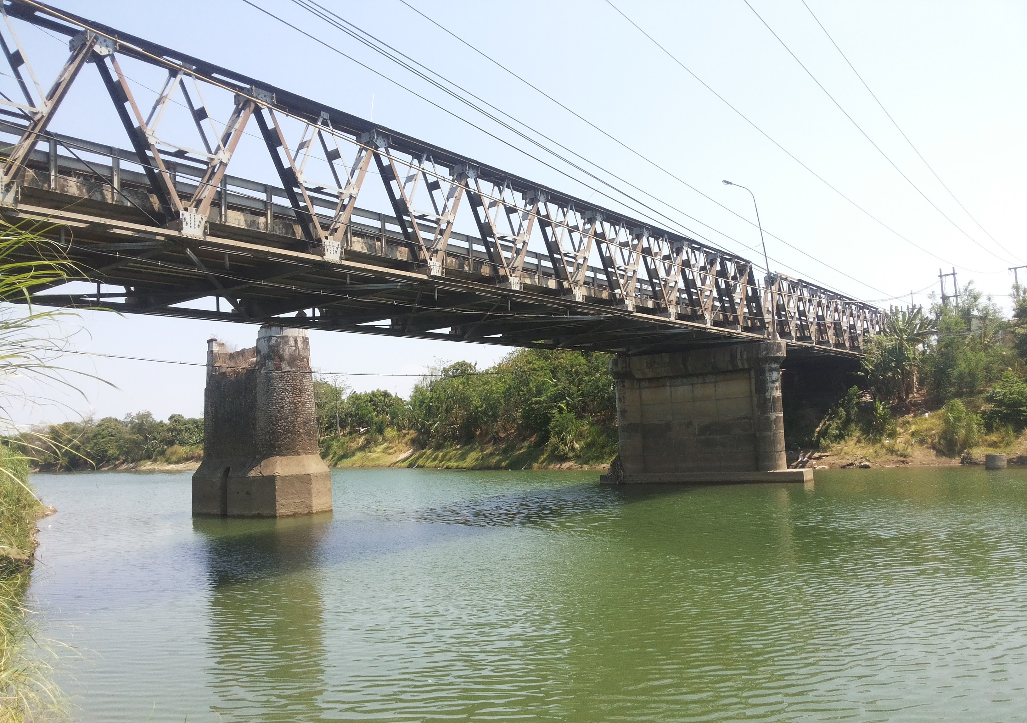 Kali Cimanuk Jawa: ꦧꦼꦔꦮꦤ꧀ ꦕꦶꦩꦤꦸꦏ꧀